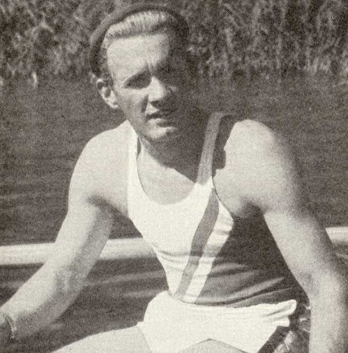 Evert Gunnarsson